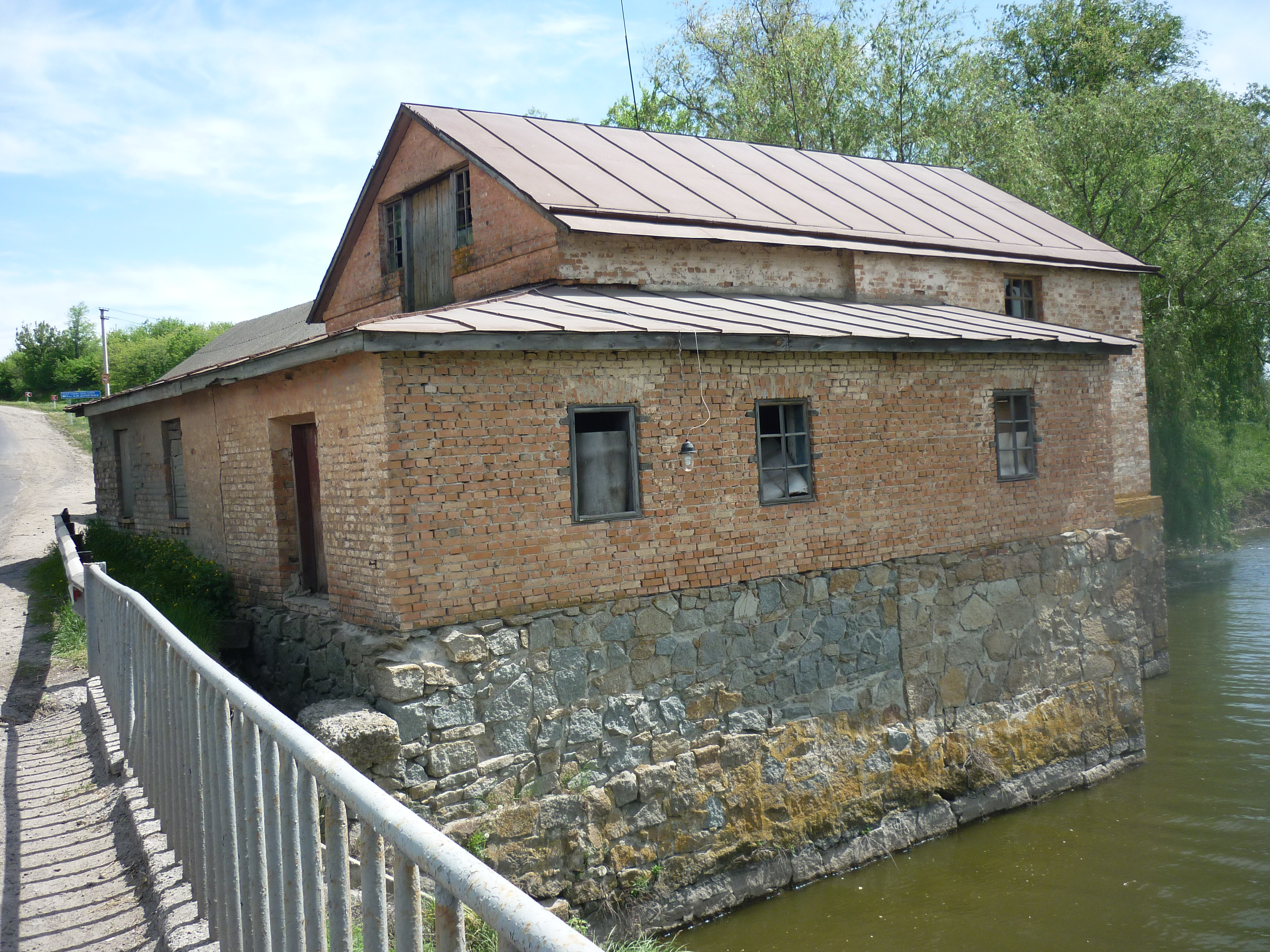 Село Доброволди Уманського району Черкаської області. Водяний млин на річці Ревуха